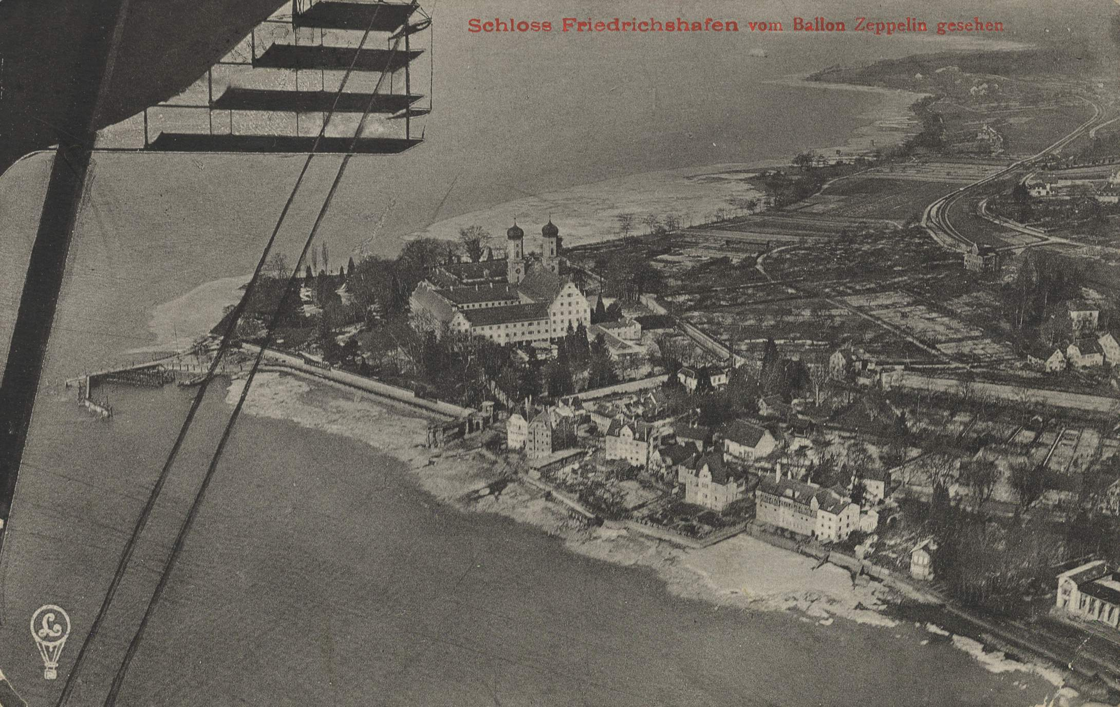 Schloss Friedrichshafen vom Ballon Zeppelin gesehen